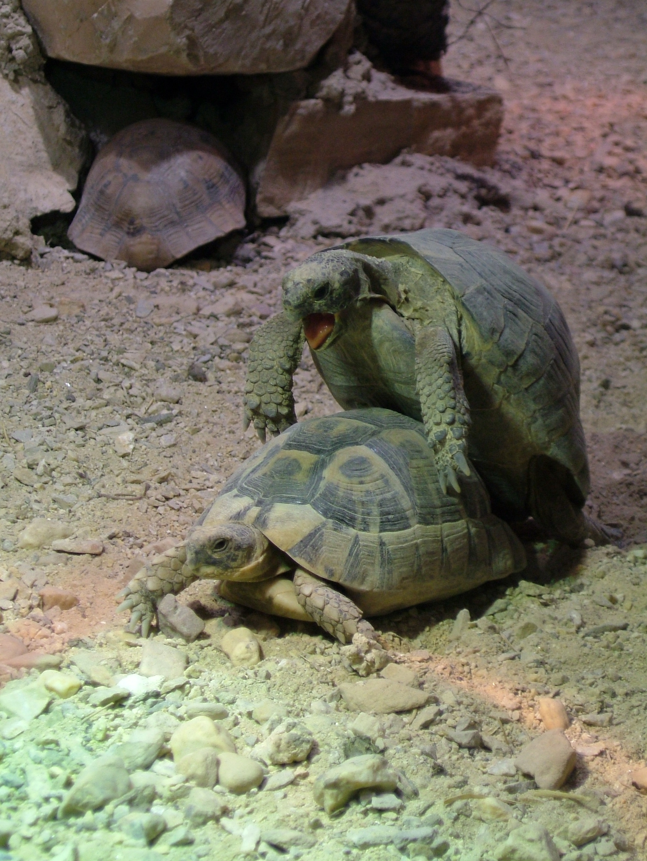 Reproduction de tortue au parc Paradisio, Belgique